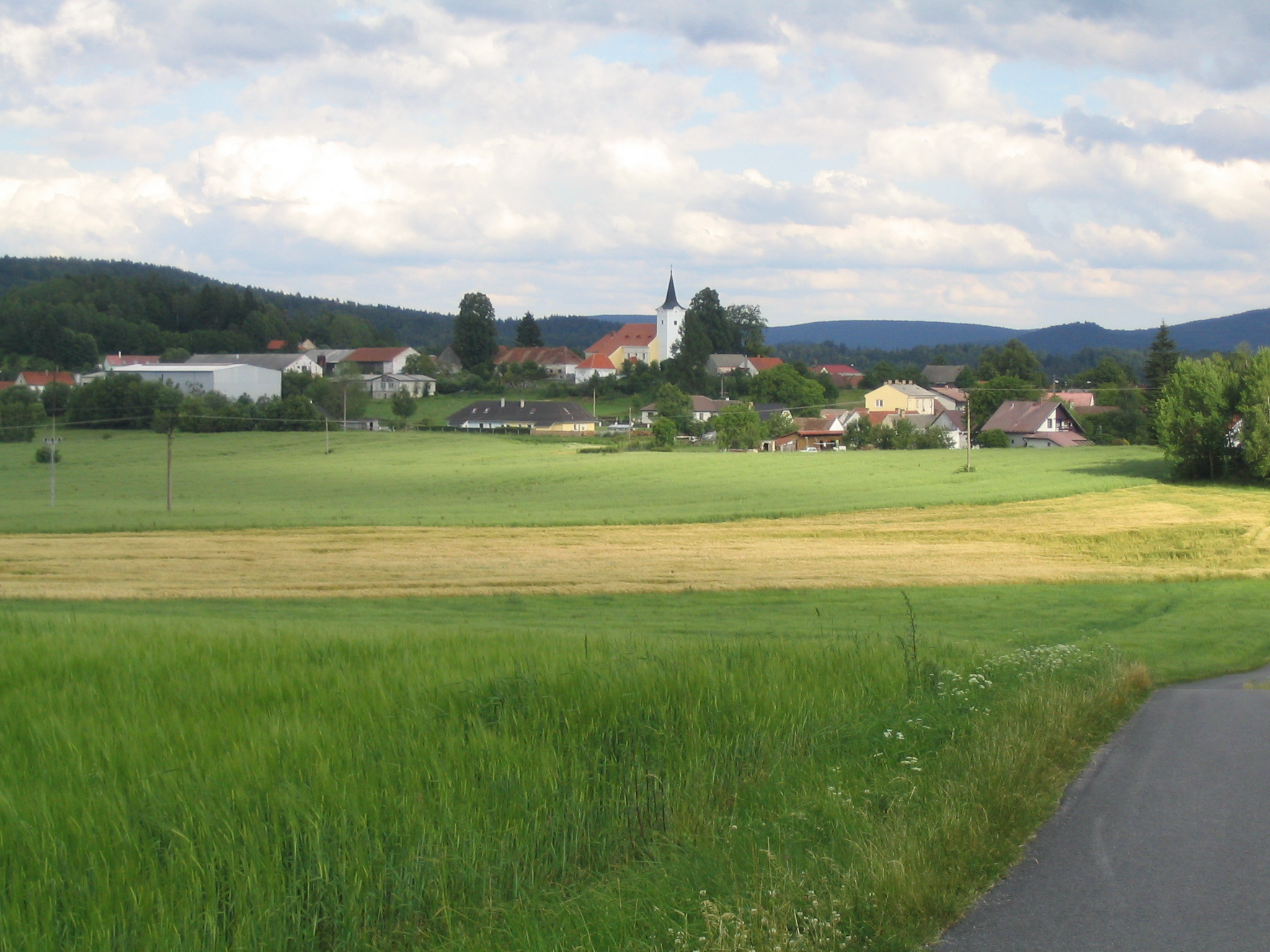 Obec Soběnov, okres Český Krumlov, od SZ.